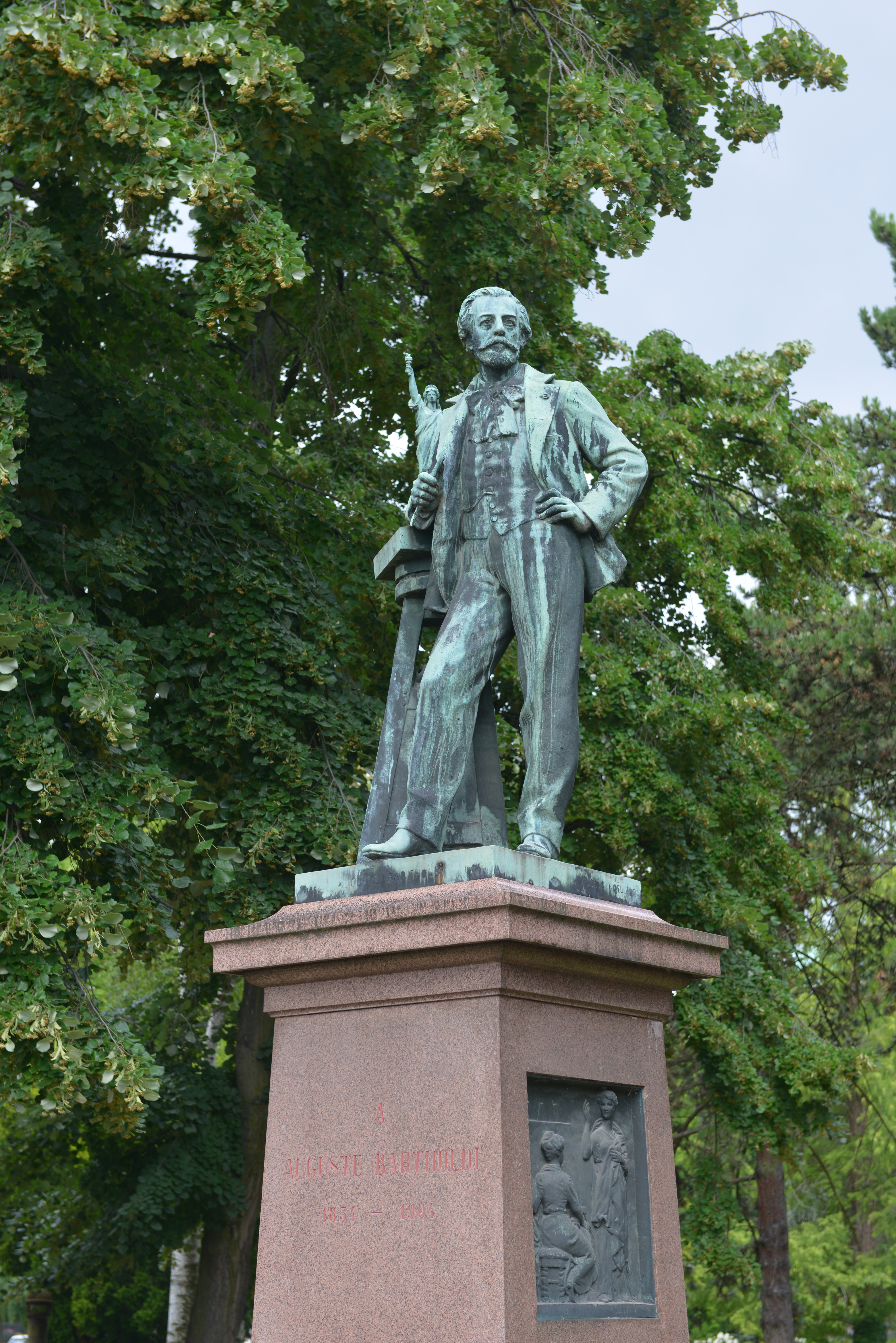 Colmar, Elsaß